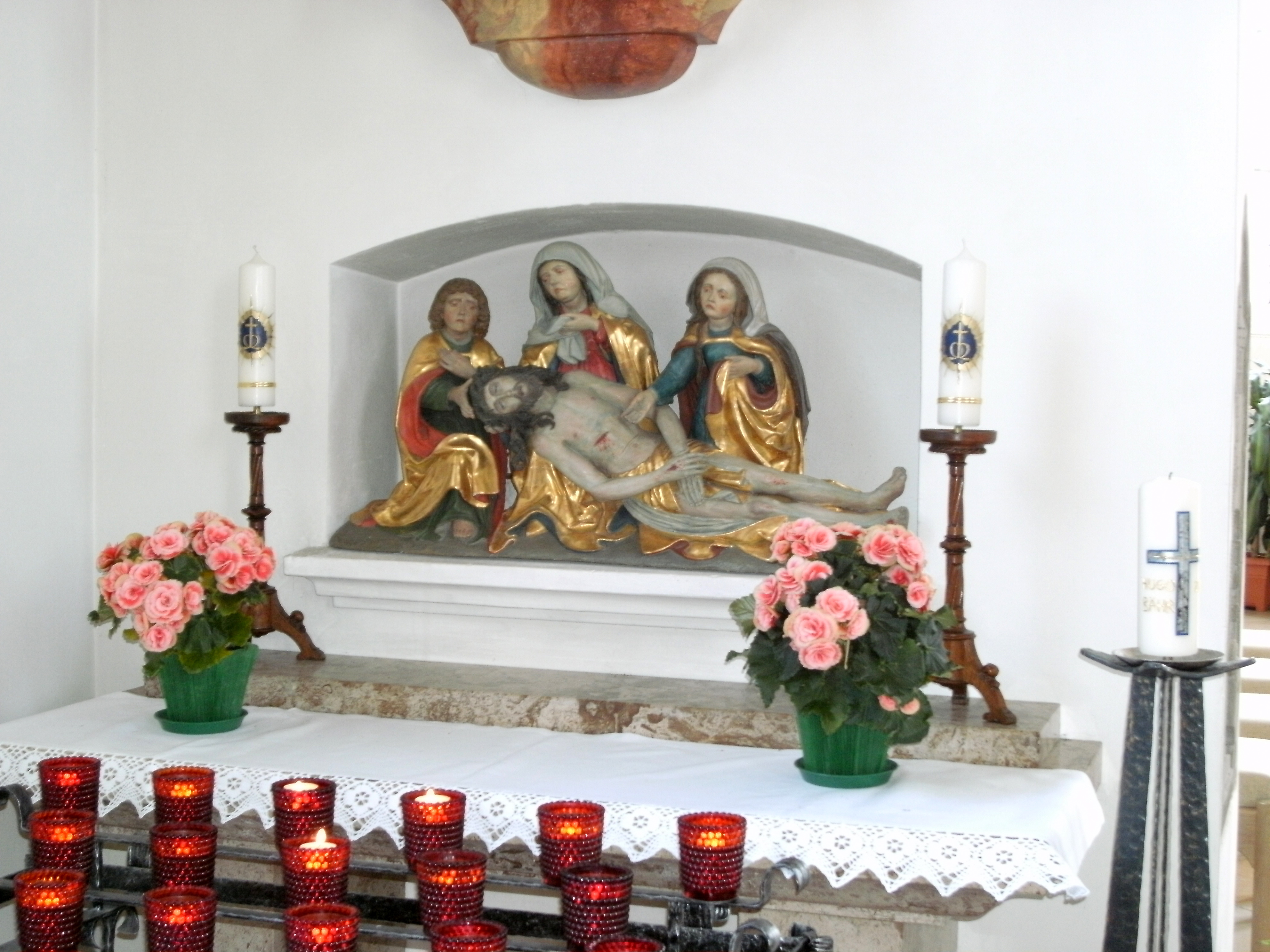 St. Georg und Sebastian(Niederkirch) - Beweinungsgruppe